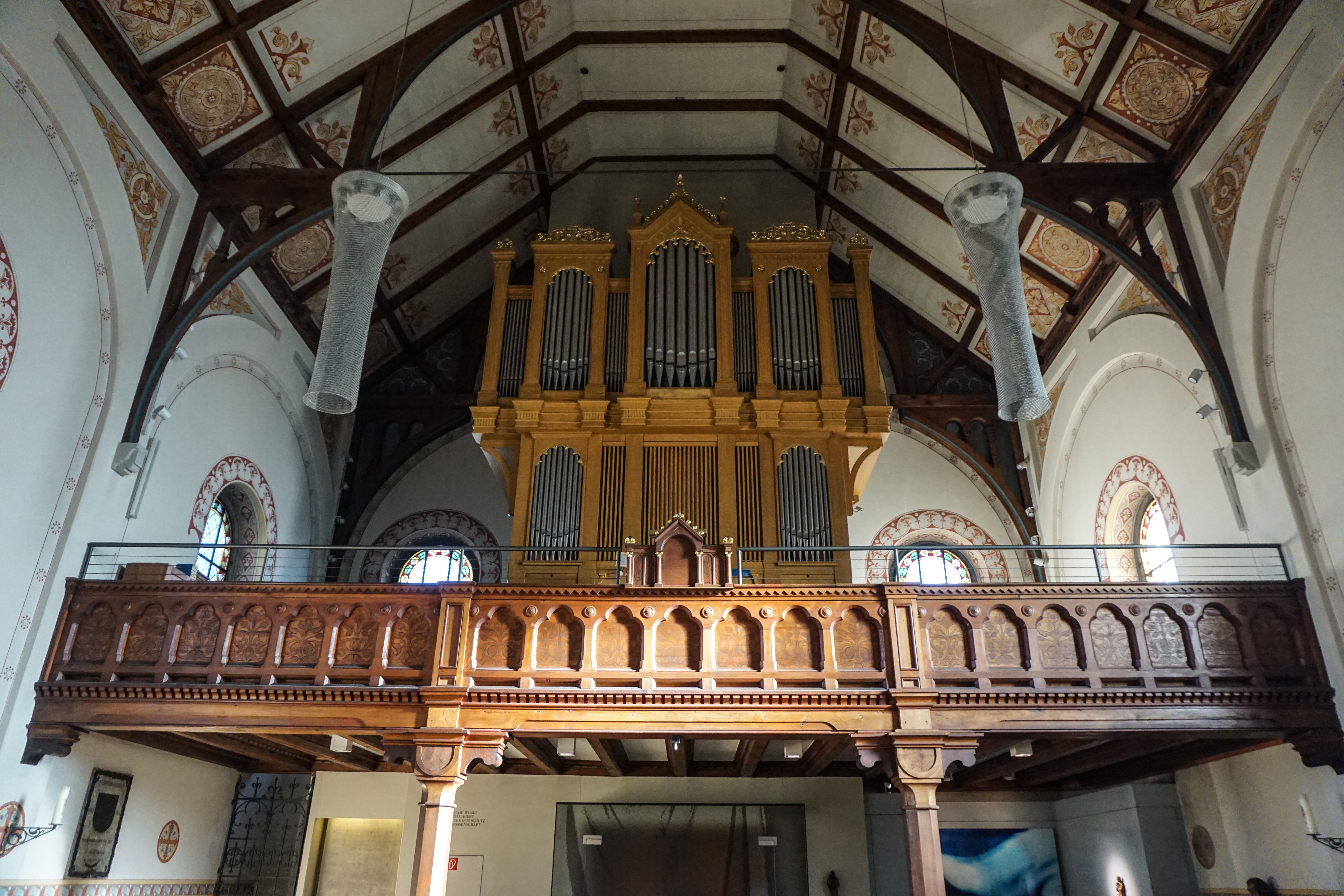 Kirche Maria Himmelfahrt Burgdorf, Empore und Orgel